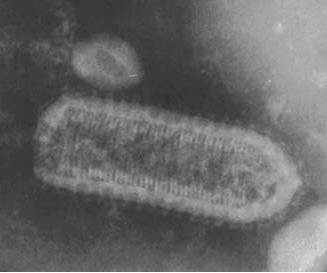 virus rayado del maiz